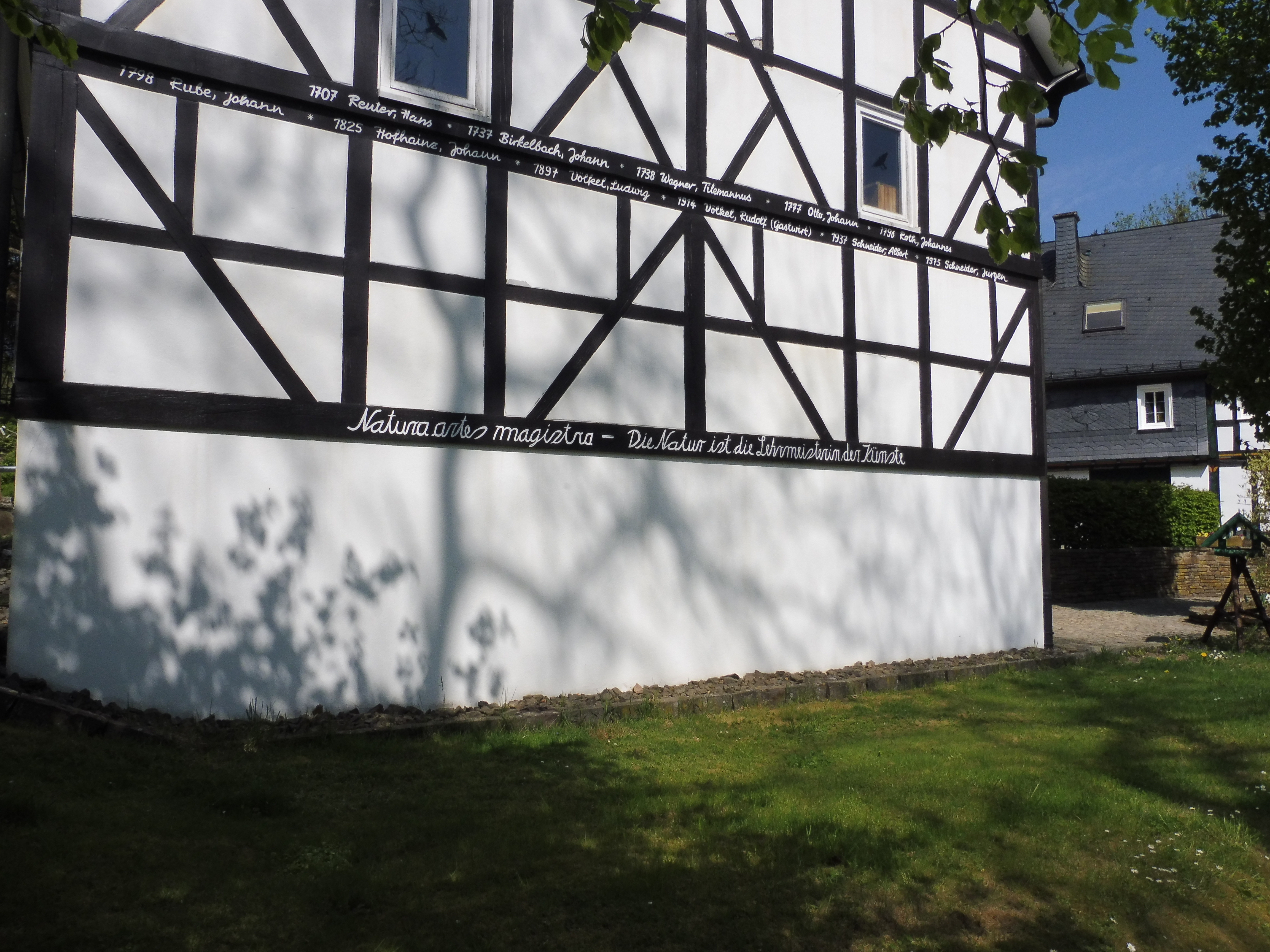 Fachwerkscheune mit Wahlspruch von Dieter Mennekes